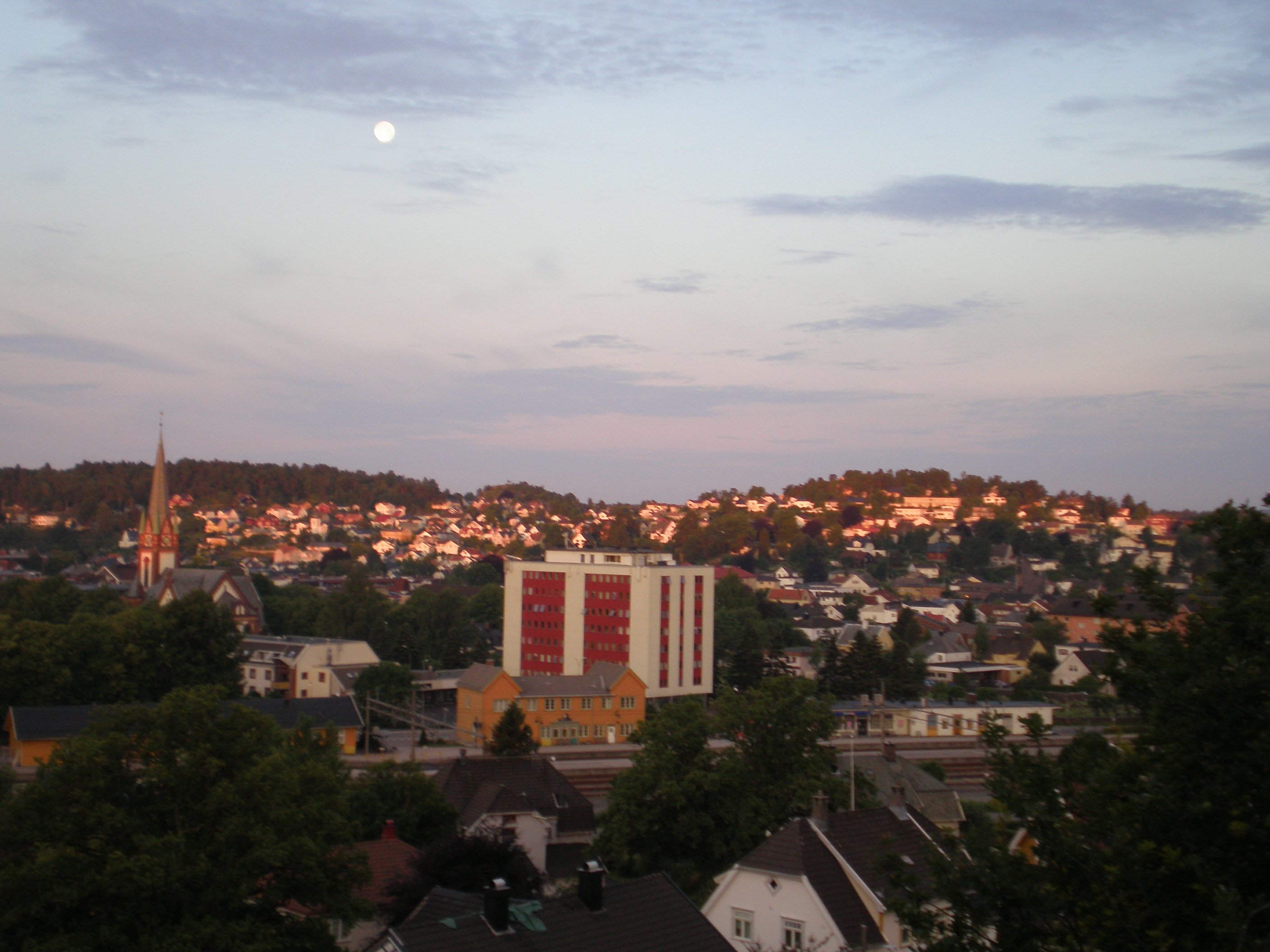 Sandefjord, Norwegia